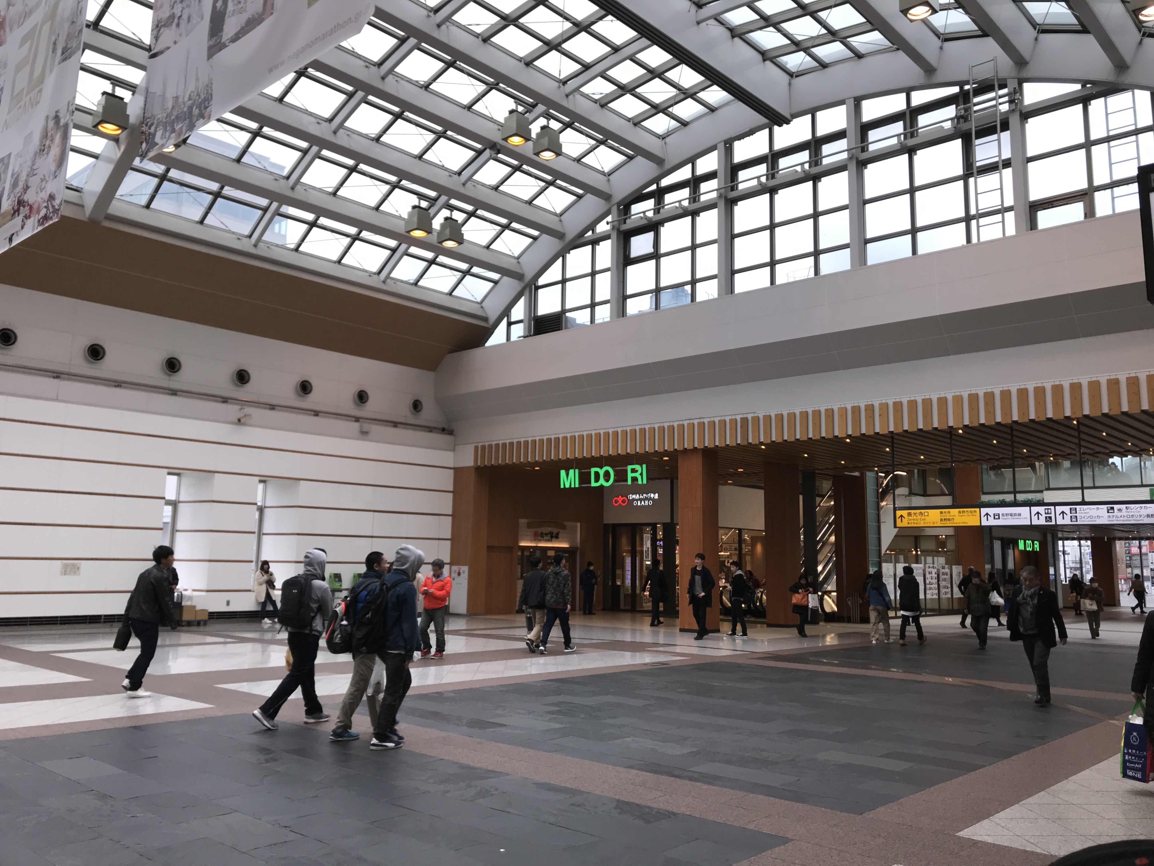 長野駅改札前コンコース